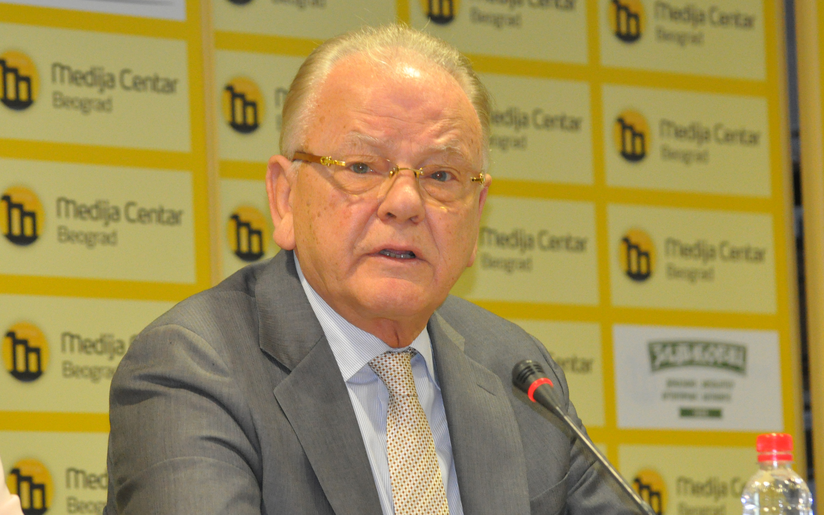 Srpskohrvatski / српскохрватски: Obraćanje javnosti košarkaškog trenera Dušana Ivkovića